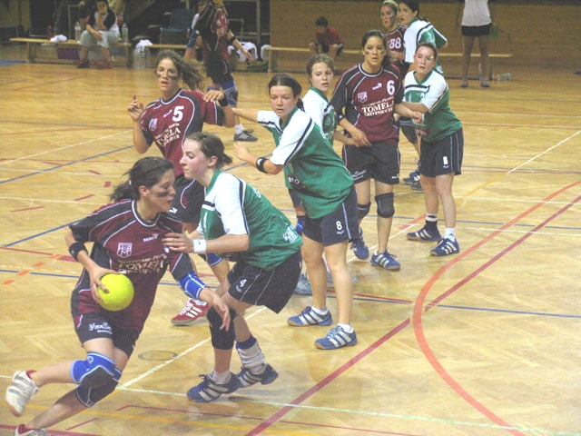 Handball Coupe-finale: Museldall - HBC Bascharage; 2005; Cadette.